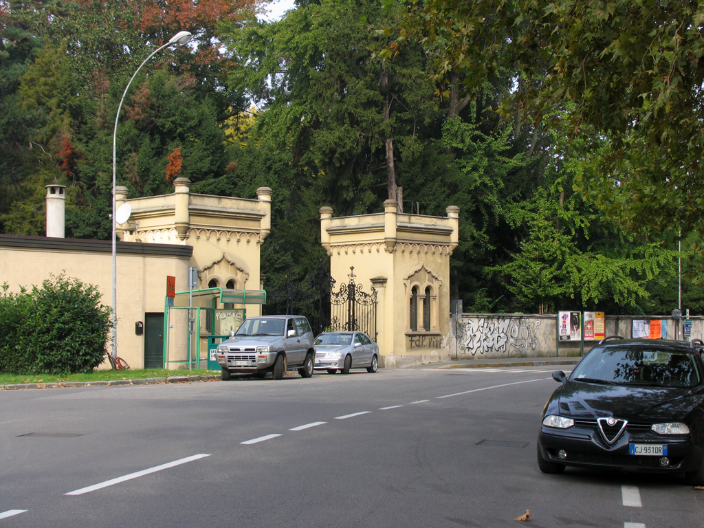 Caronno 10/2007